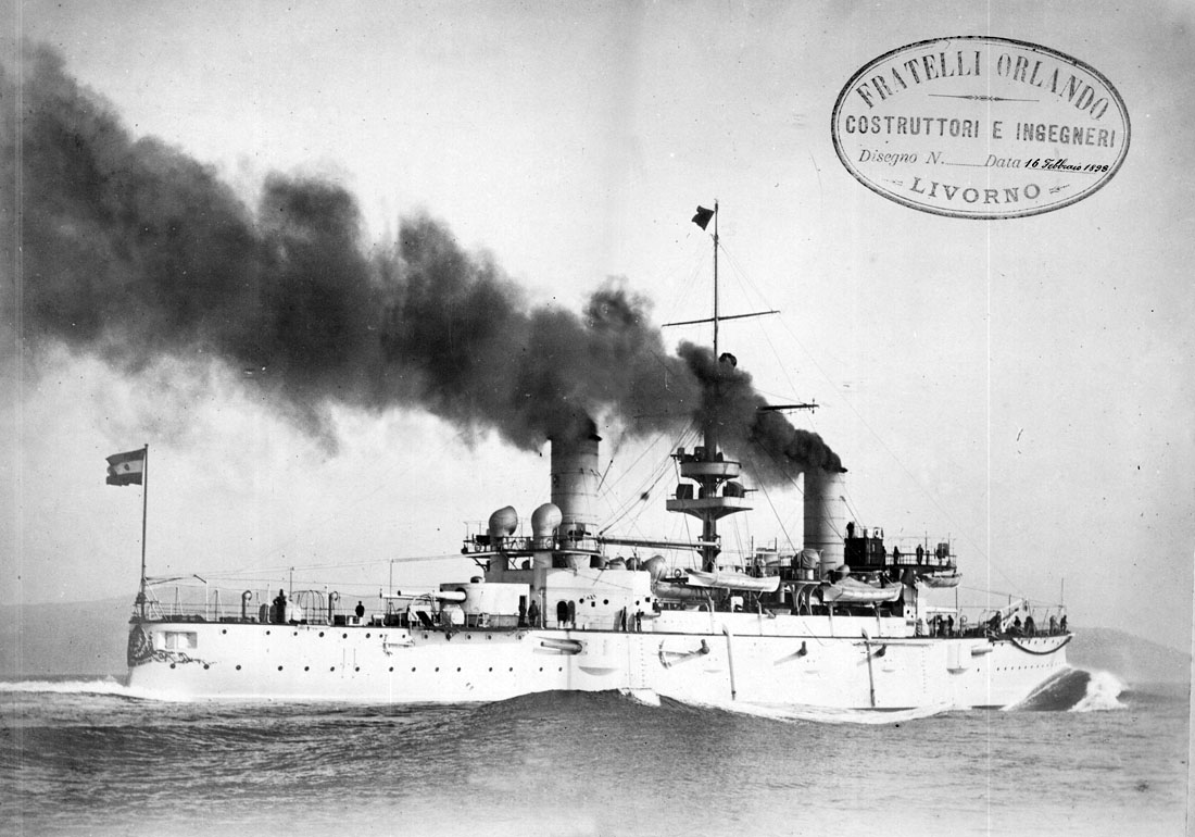 Foto del Acorazado de la armada Argentina Gral. San Martín.